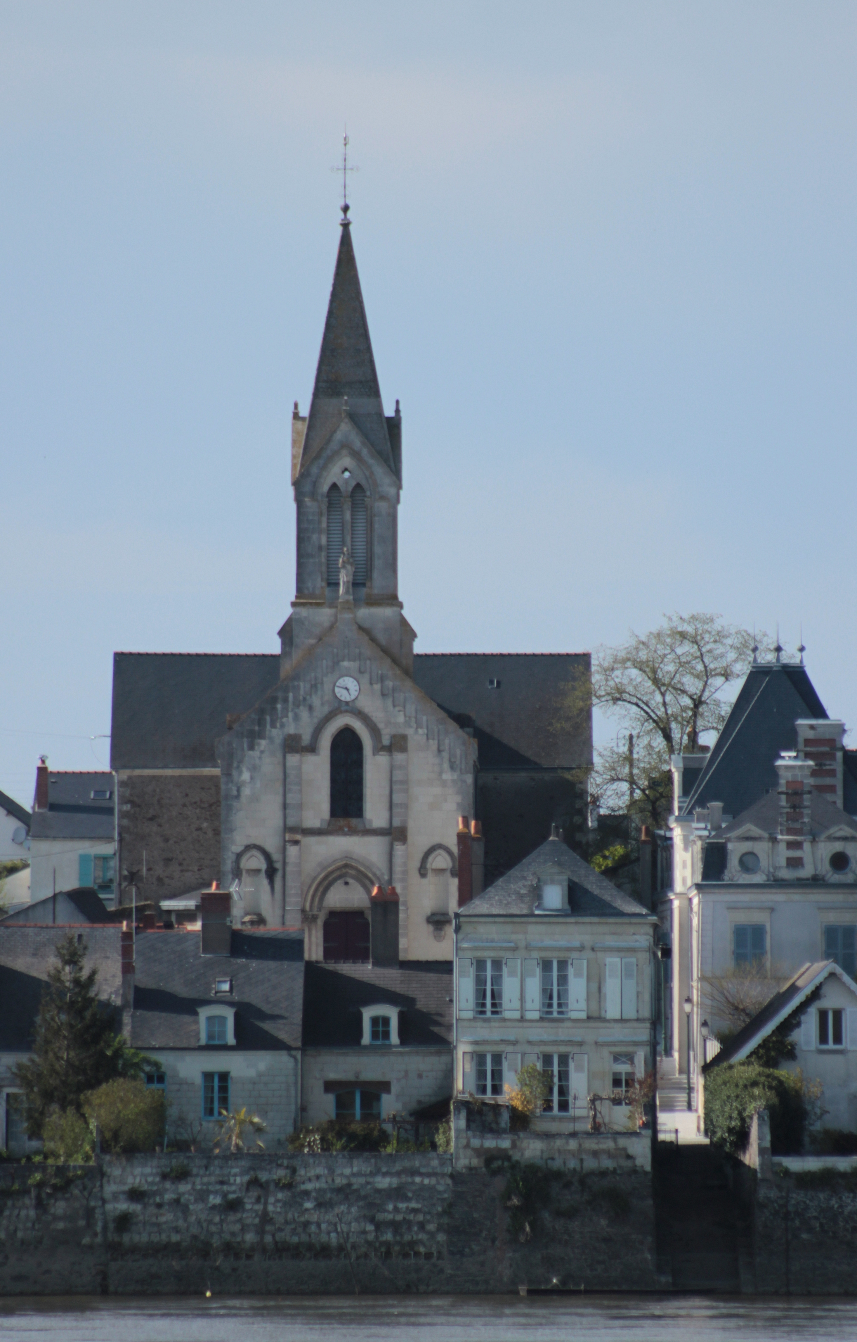 Église, Fr-49-Le Fresne-sur-Loire.